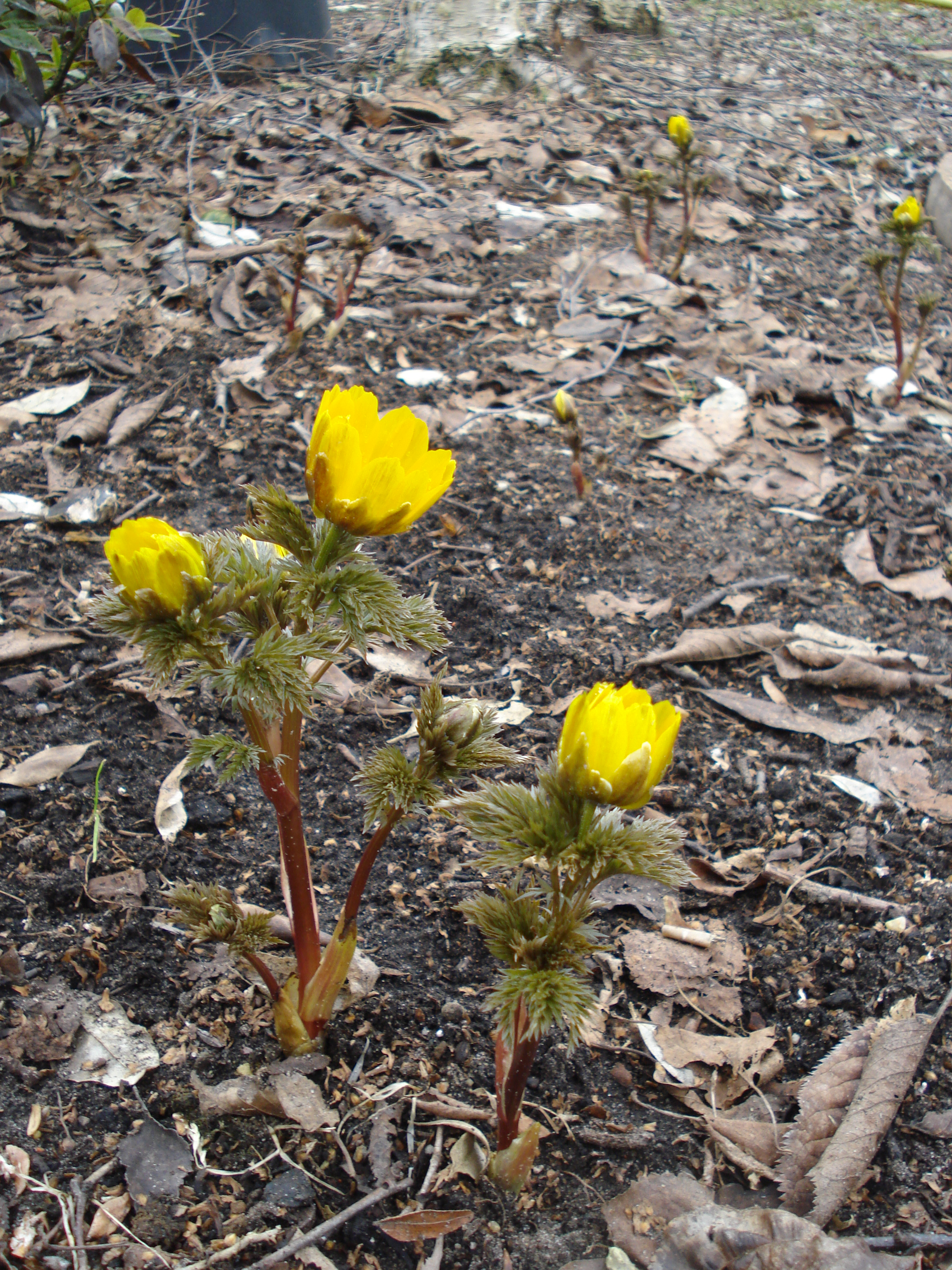 Adonis amurensis, verschiedene Pflanzen, verschiedene Entwicklungsstufen